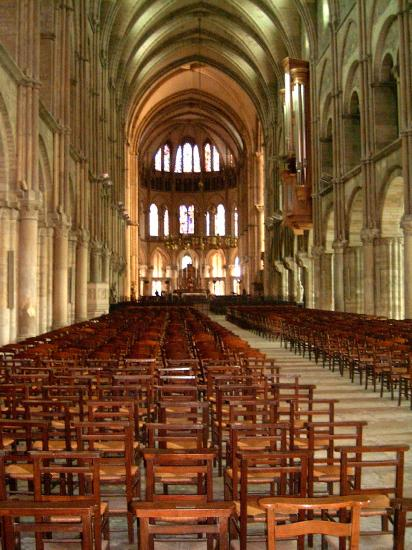 Choeur de la Basilique Saint Remi de Reims